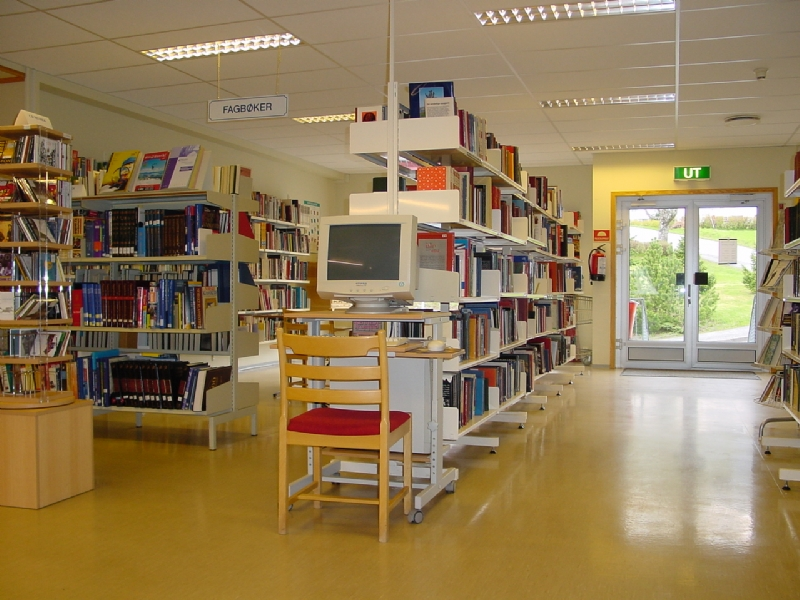 Eide bibliotek 2008